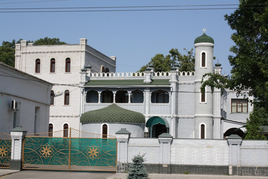 Полтавська міська мечеть. Збудована у 2000 р.